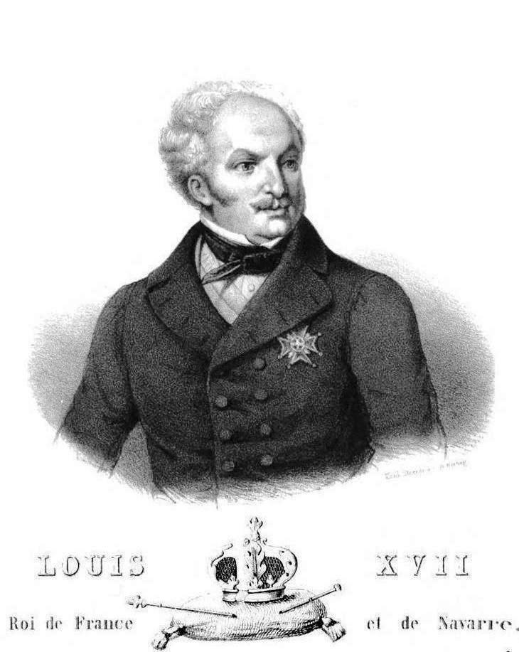 "Louis XVII, Roi de France et de Navarre".